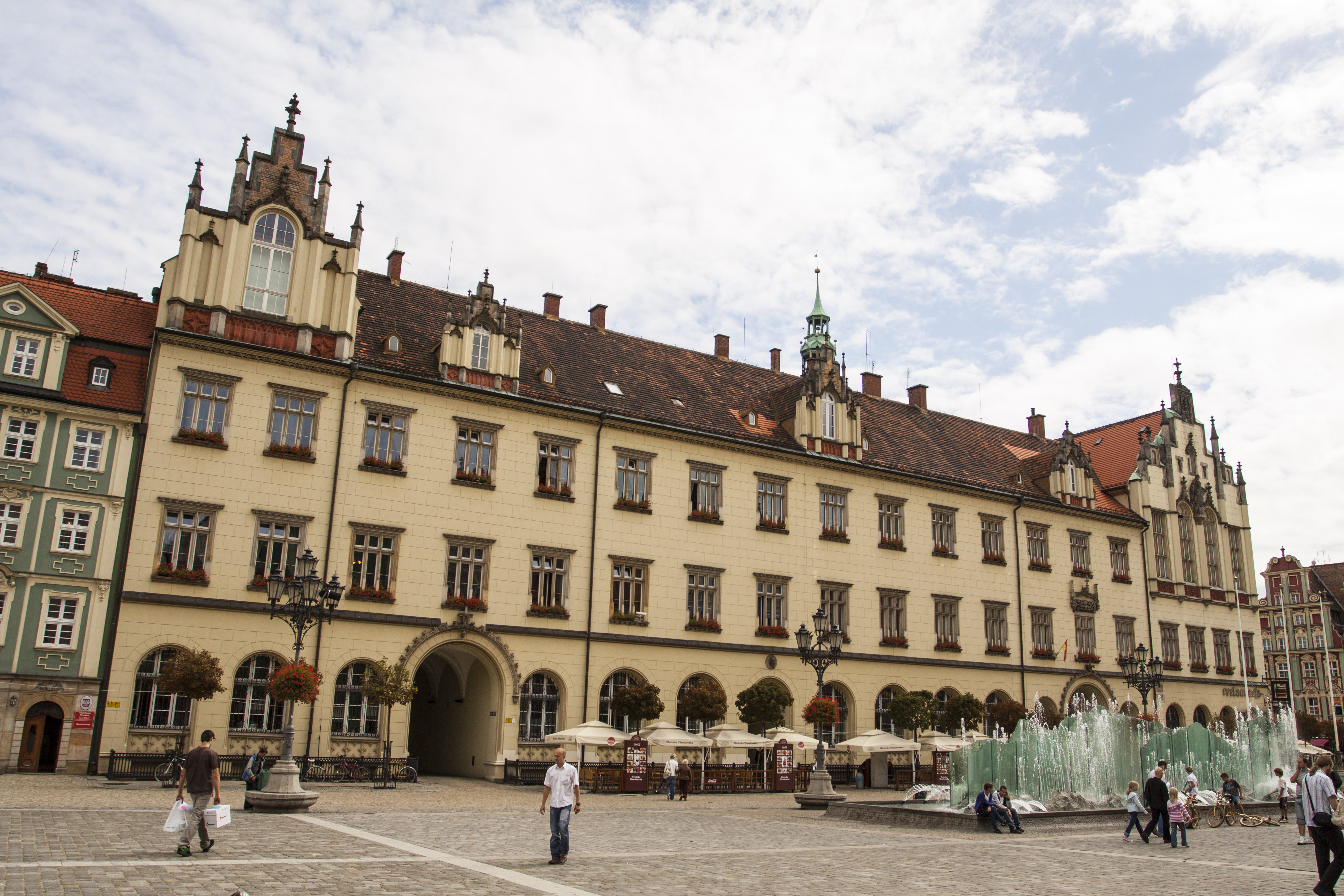 Nowy Ratusz Sukiennice 7-9 (Rynek-Ratusz 3-6), Miasto Wrocław - Stare Miasto